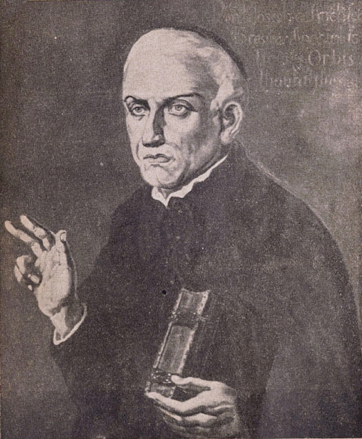 Depicted person: José de Anchieta